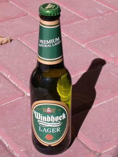 Windhoek-Lager-bottle